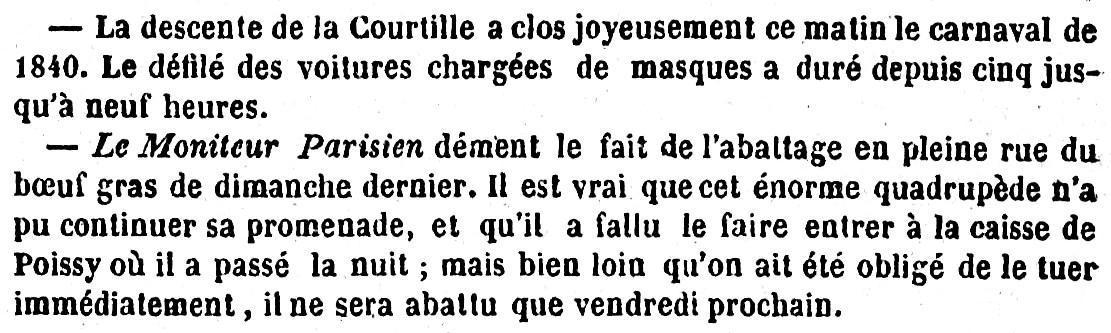 Échos de la descente de la Courtille et du Bœuf Gras 1840 au Carnaval de Paris.